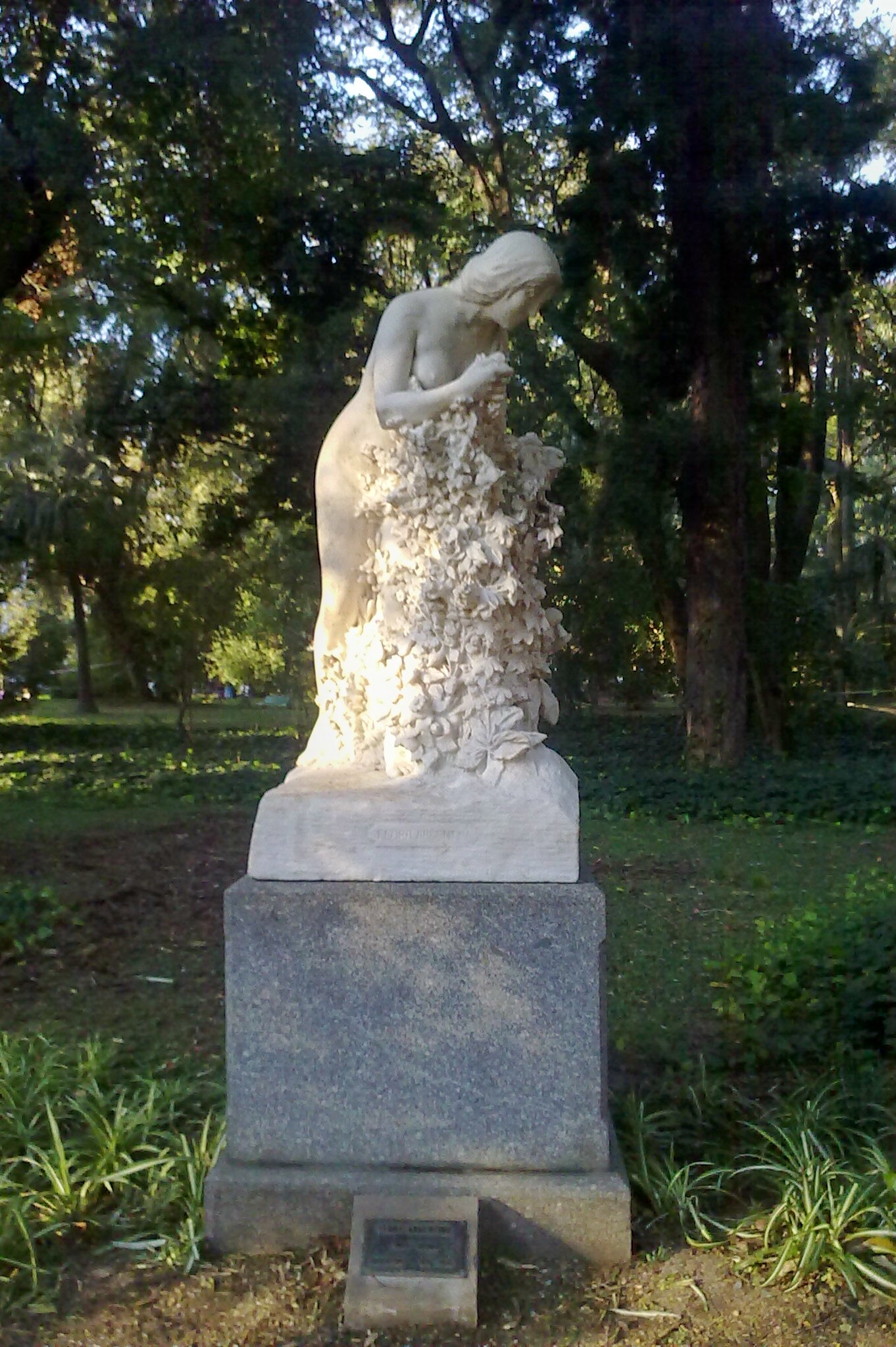 Estatua La Flora Argentina, de Emilio Andina (1875-1935), realizada en mármol y granito, inaugurada el 2 de mayo de 1929. Usualmente se halla en el Jardín Botánico de Buenos Aires.